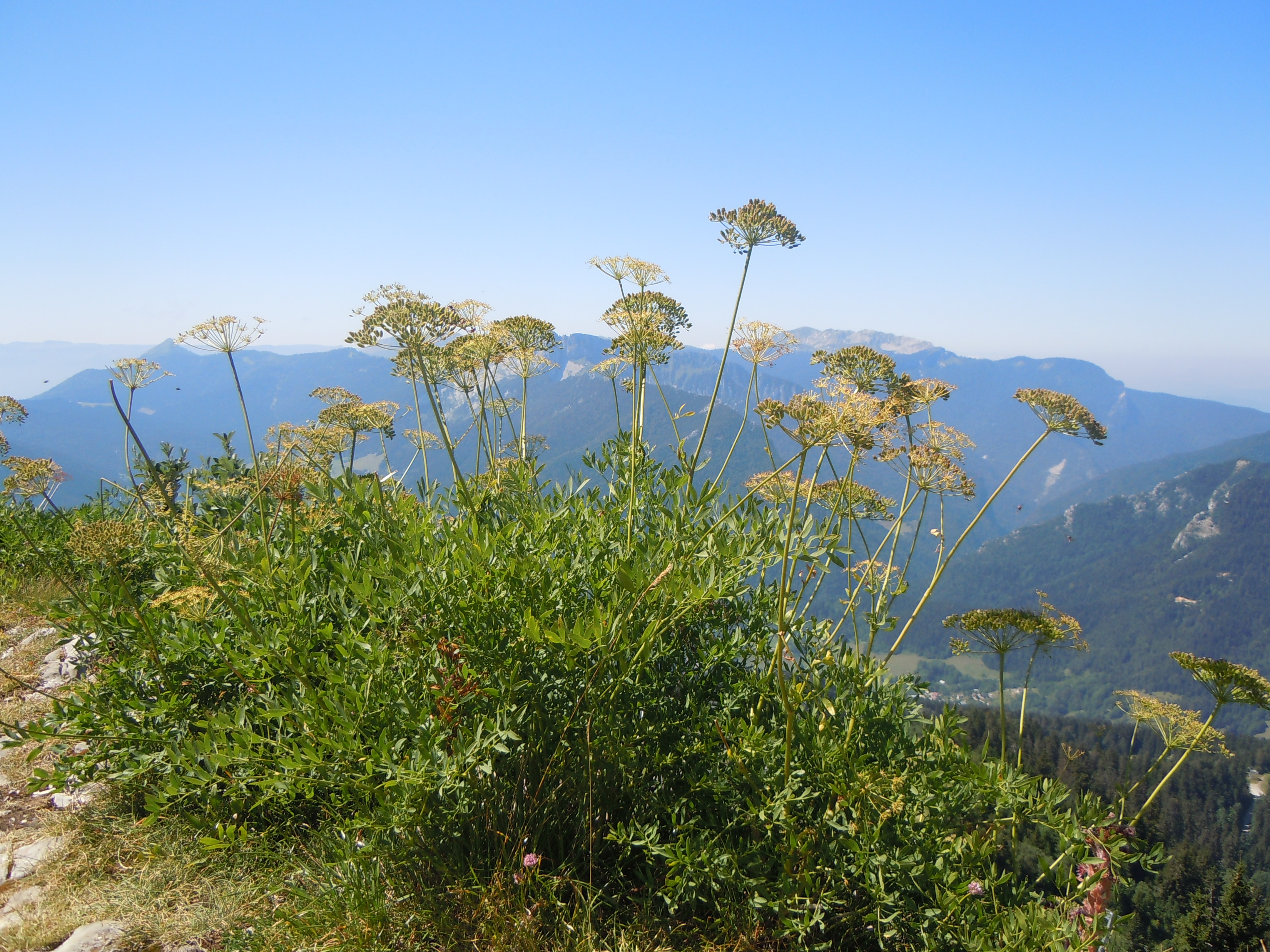 Sermontain, Laserpitium siler, Chartreuse